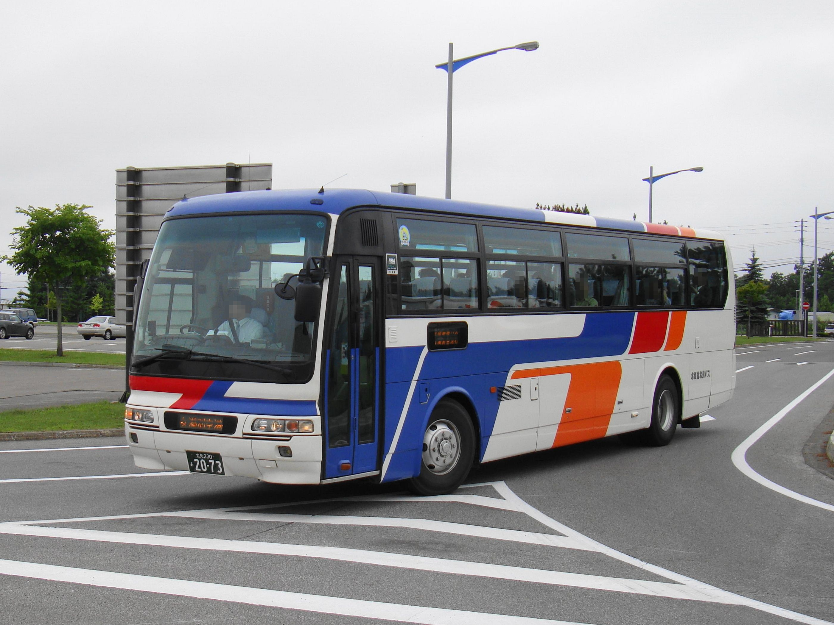 Kitami to Memanbetsu Airport